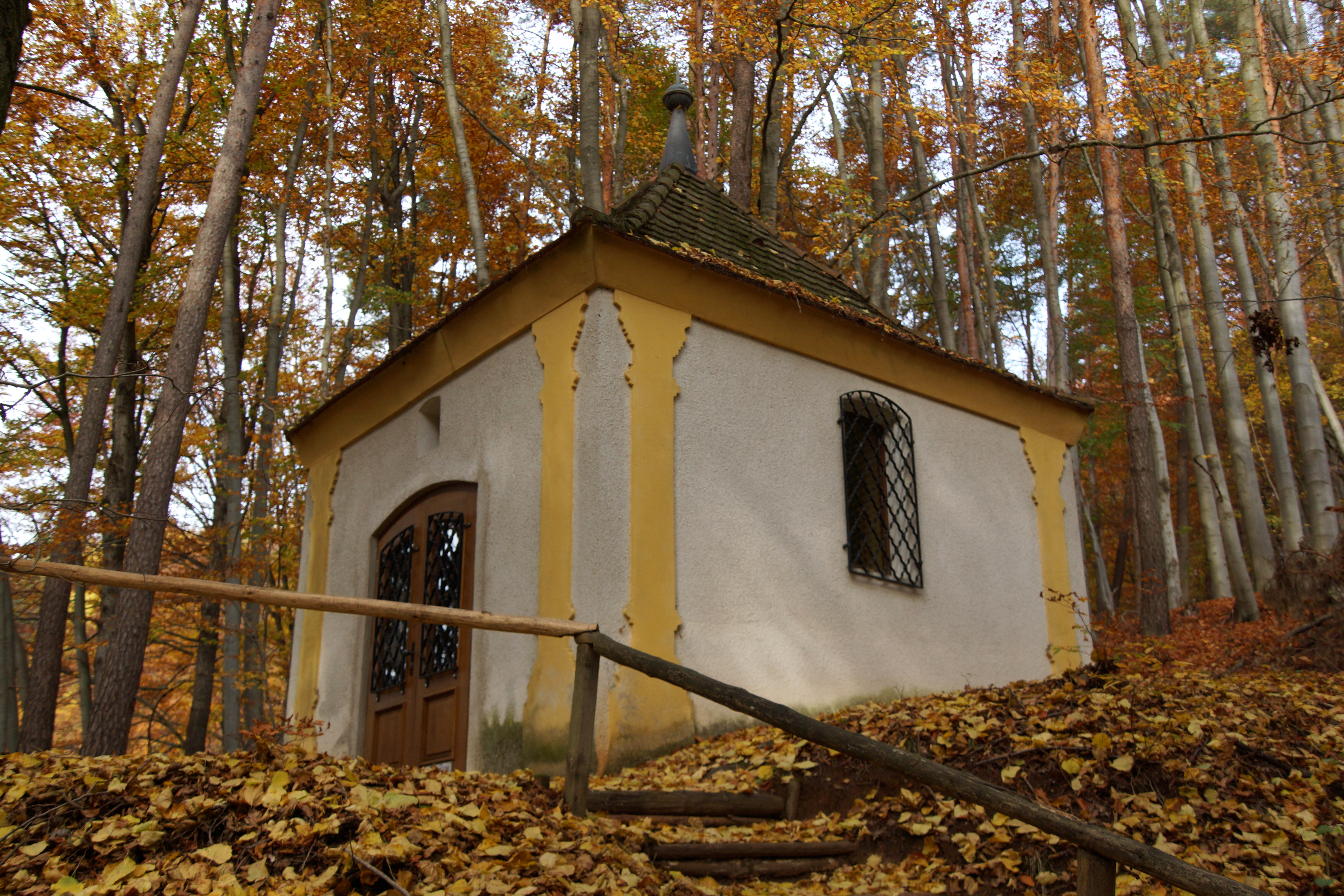 Die Waldkapelle St. Jakobus am Ottenberg im Herbst